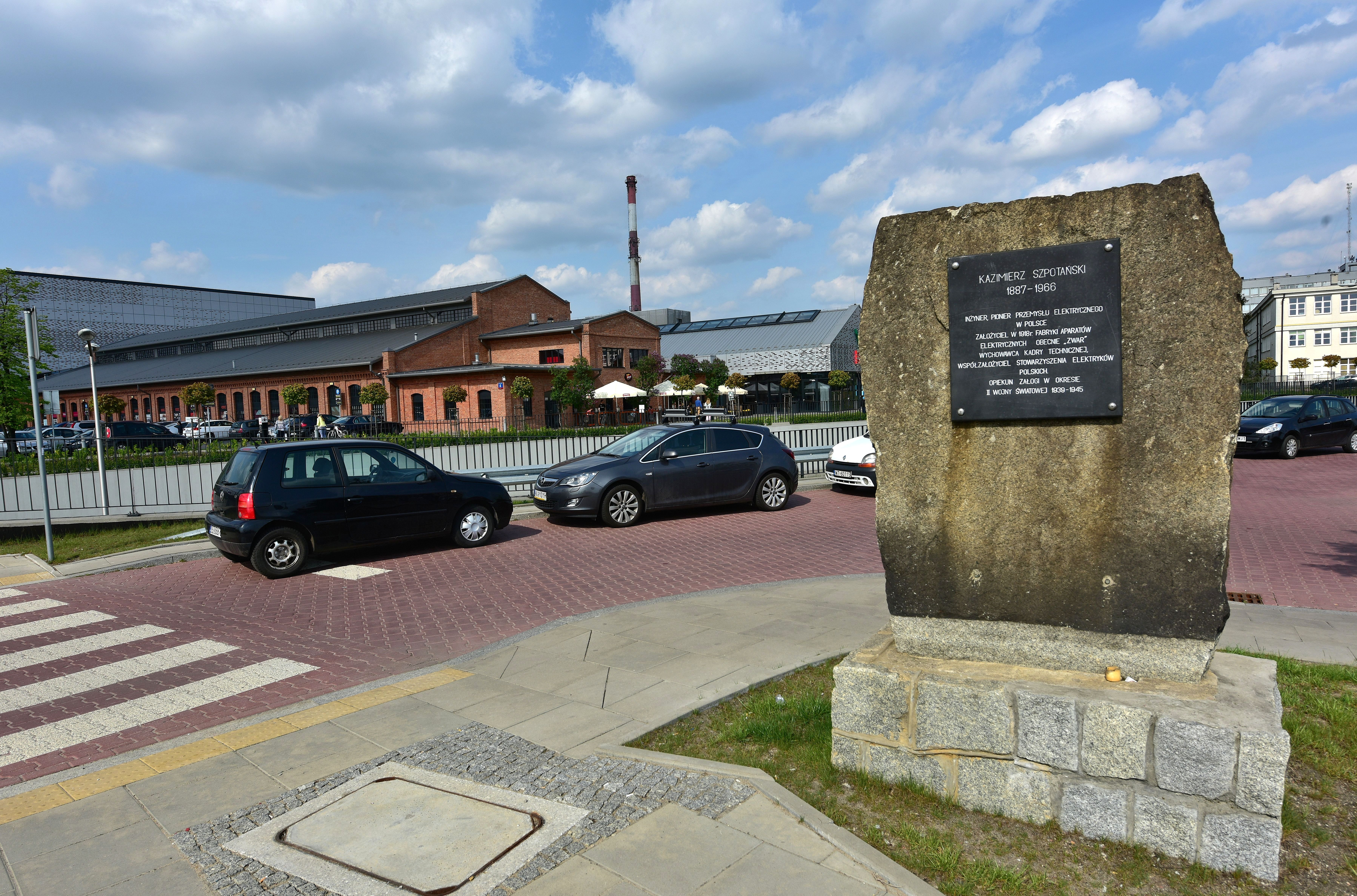 Upamiętnienie Kazimierza Szpotańskiego przy ul. Szpotańskiego róg ul. Żegańskiej w Warszawie